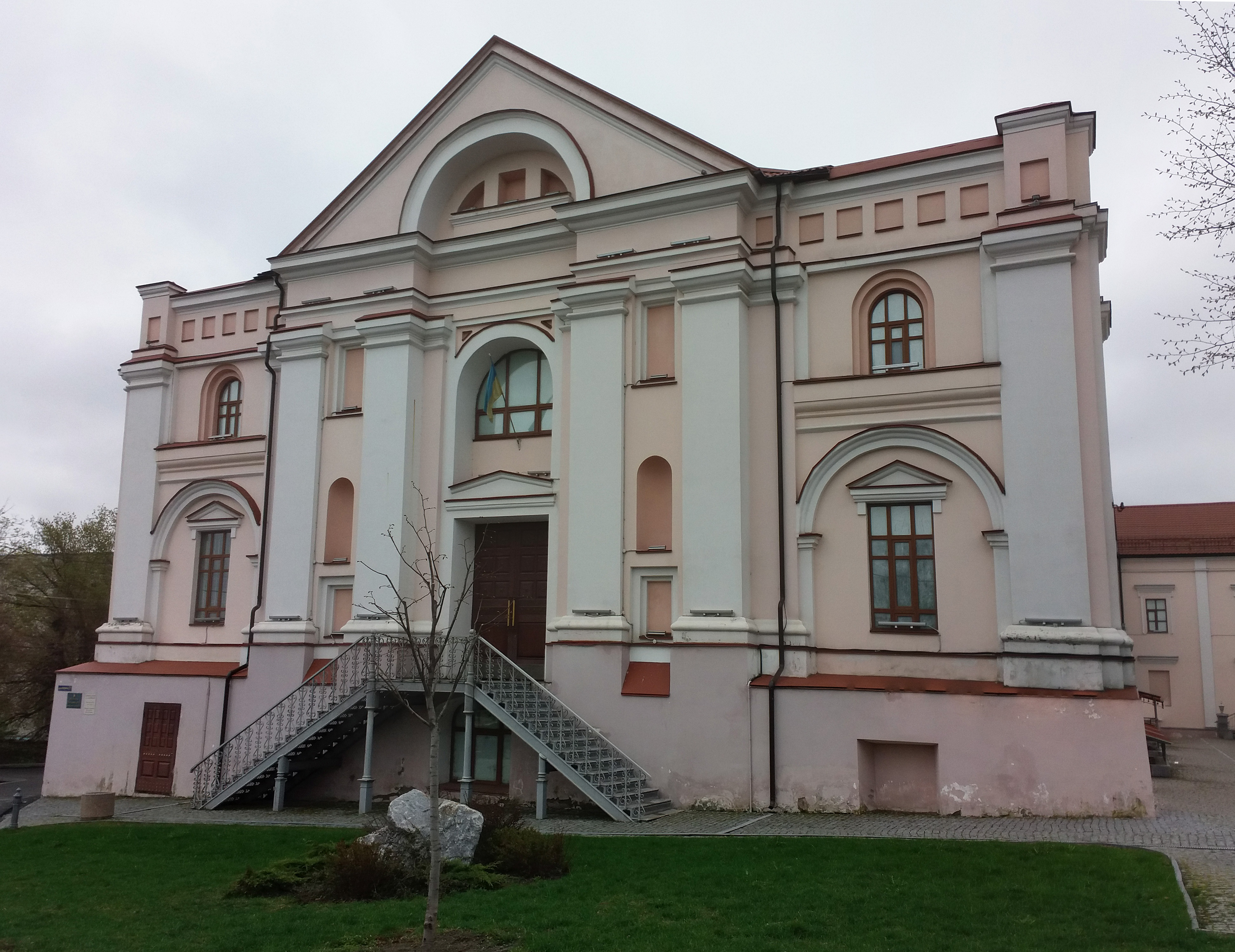 м. Вінниця, Єзуїтський монастир. Вулиця Соборна, 17